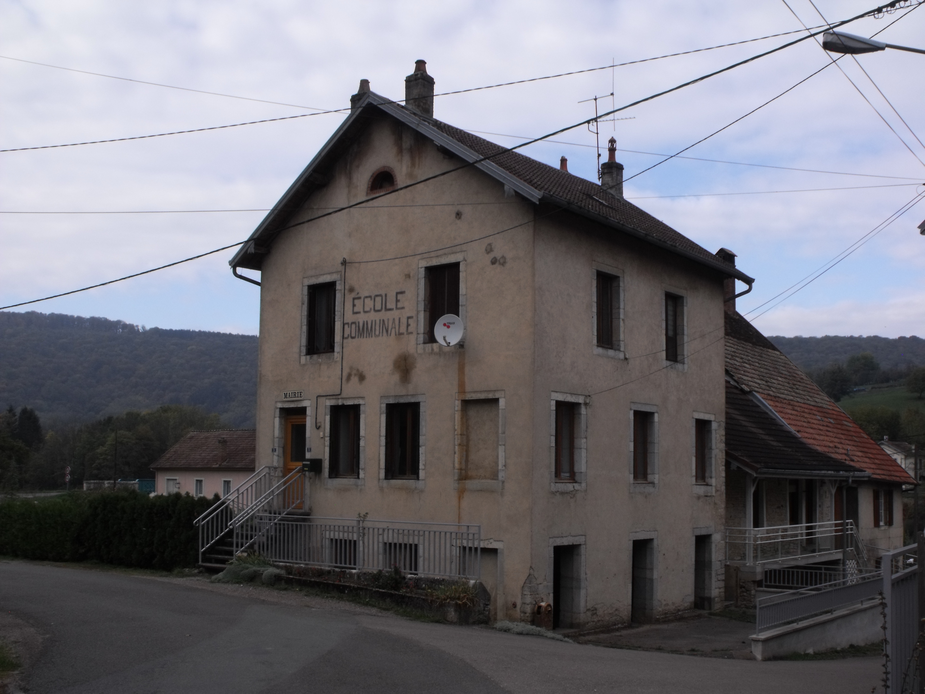 Mairie de Hyevre-Magny, Doubs, France